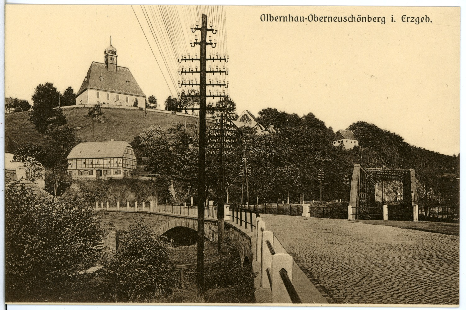 Olbernhau; Oberneuschönberg This postcard is from publisher Brück & Sohn in Meißen ( postcard has a unique number 24260 and is available in a higher resolution at the publisher. This images was uploaded in a cooperation project between Wikipedians and the publisher.